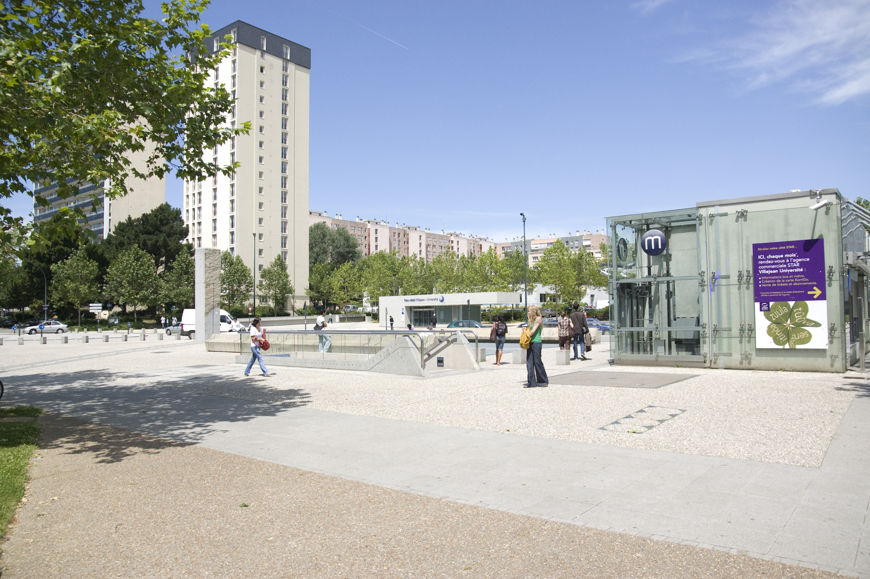 Station de Métro Villejean-Université